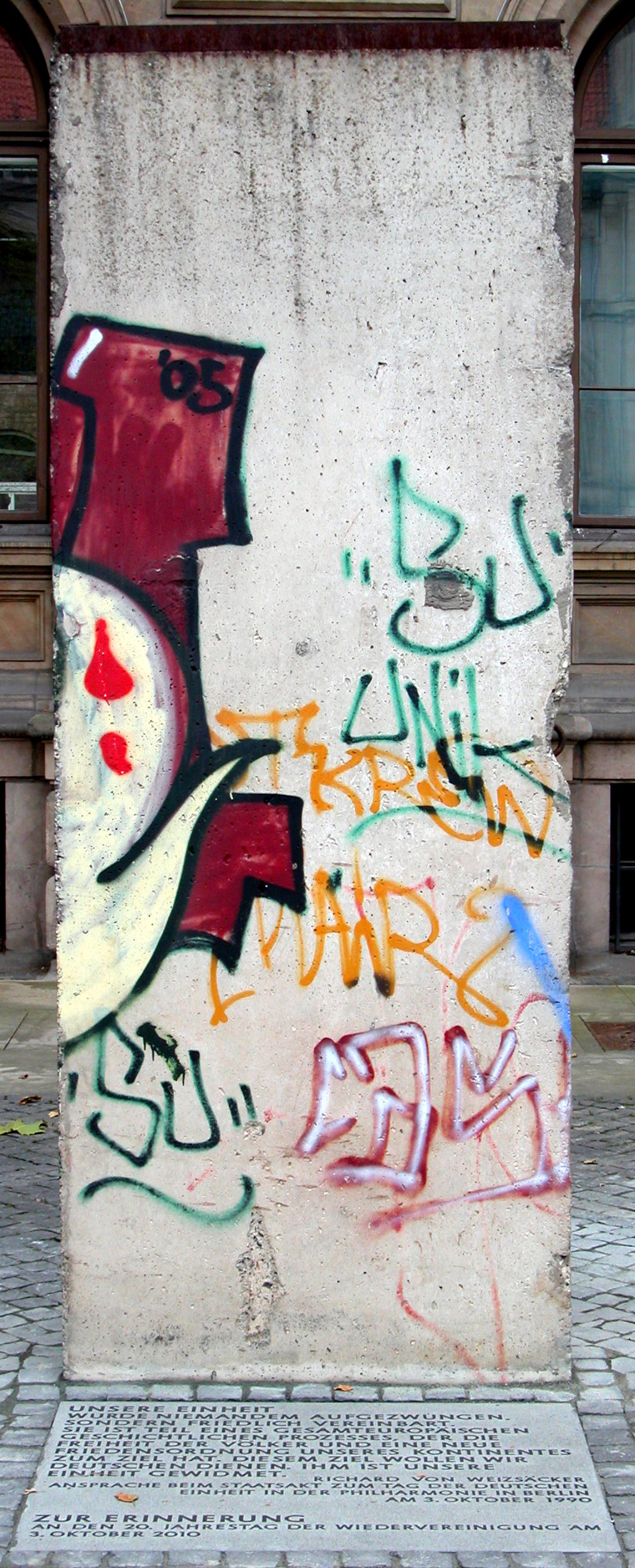 Braunschweig: Mauer-Denkmal mit Gedenkplatte.